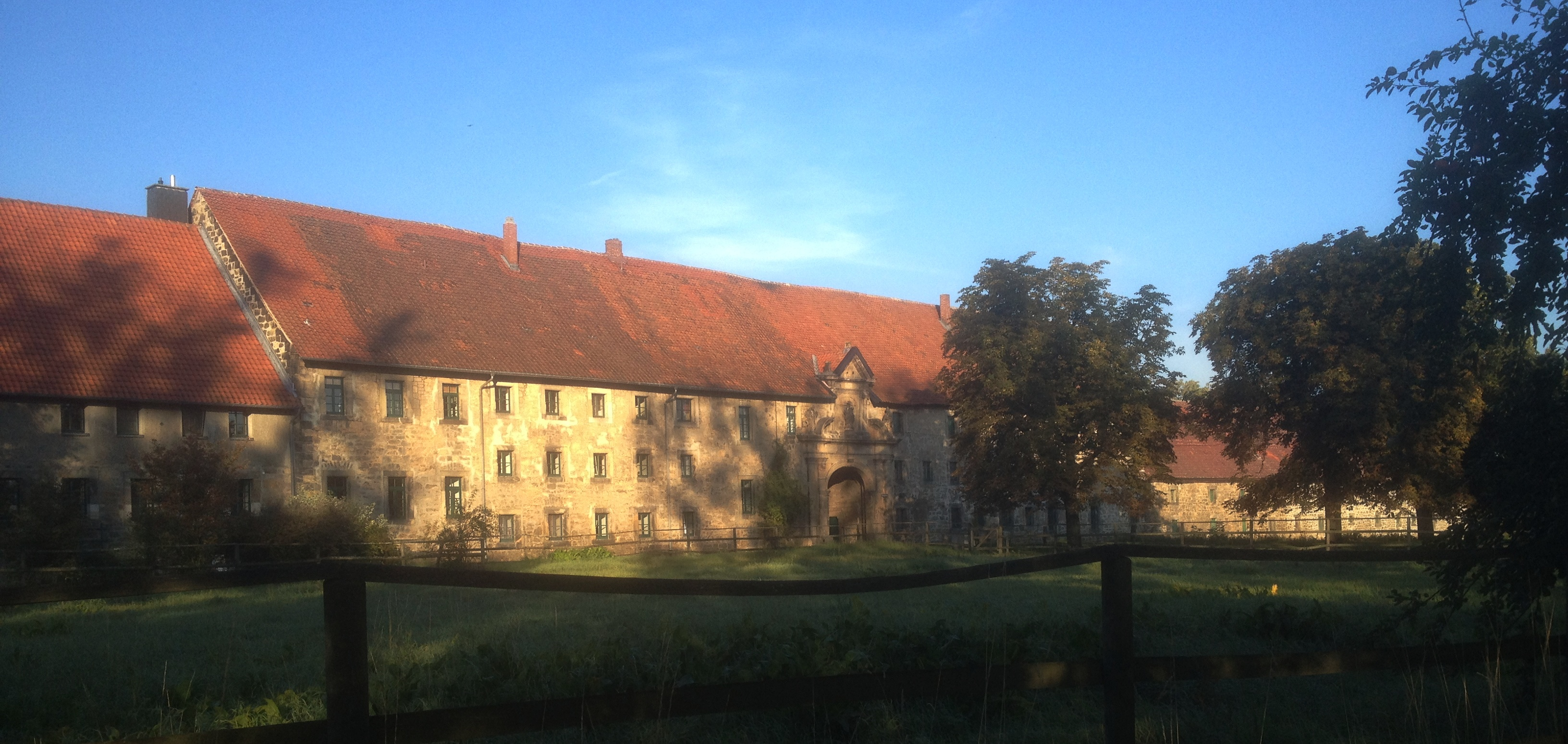 Kloster Riechenberg, Goslar, Ostflügel der barocken Klosteranlage